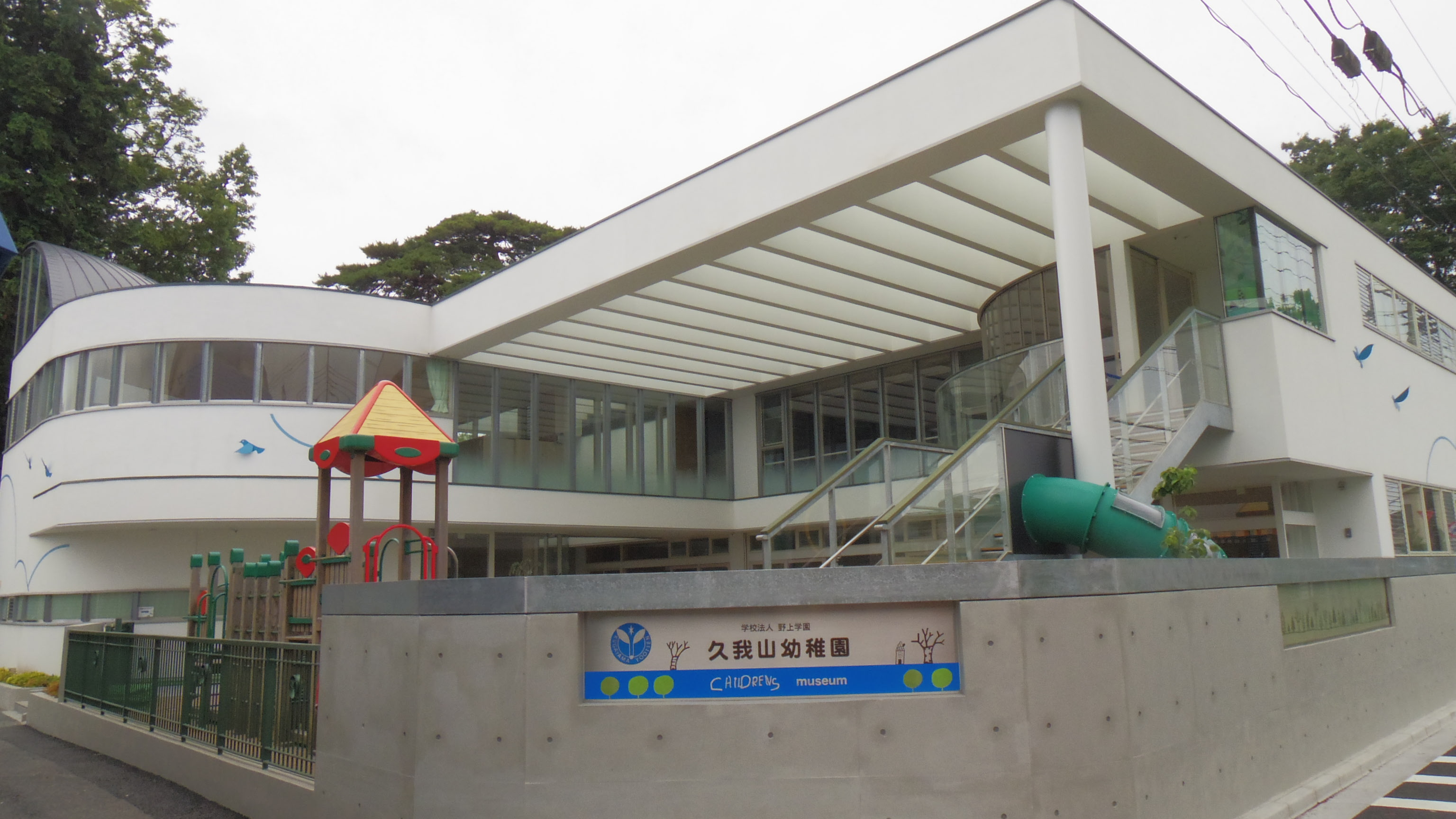 学校法人野上学園 久我山幼稚園（2016年6月19日撮影）